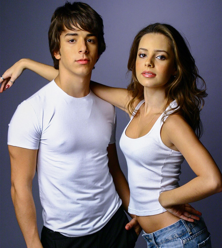 Sandy e Junior fotografados em maio de 2004, revista Vogue